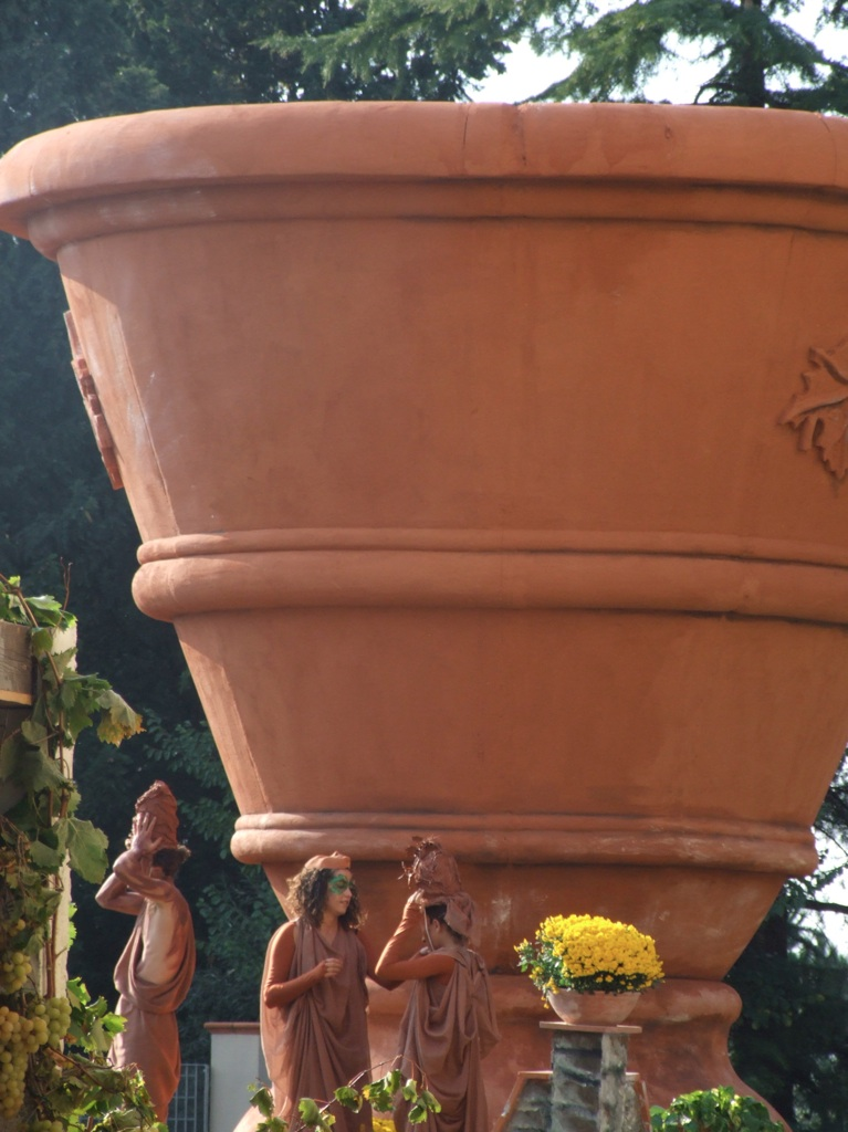 Carro allegorico realizzato interamente dagli abitanti di Impruneta per la « Festa dell’Uva » che, dal 1926, si svolge ogni anno nell’ultima domenica di settembre.